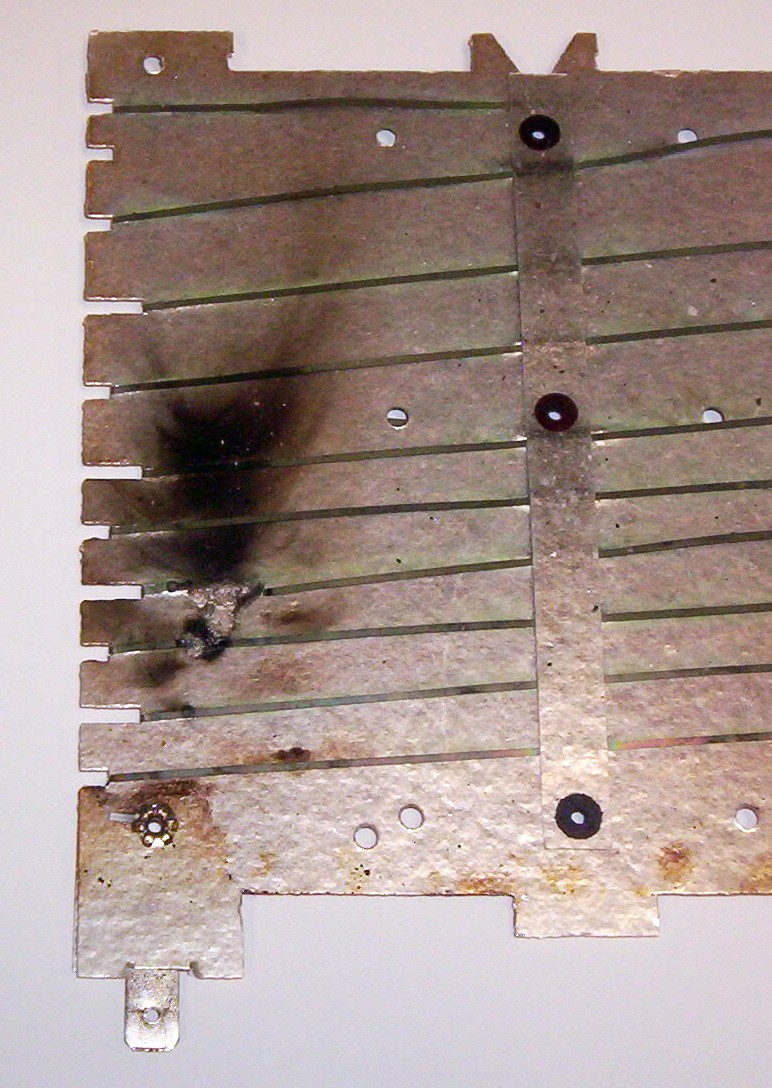 Kurzschluss (Masseschluss) an einem Toaster